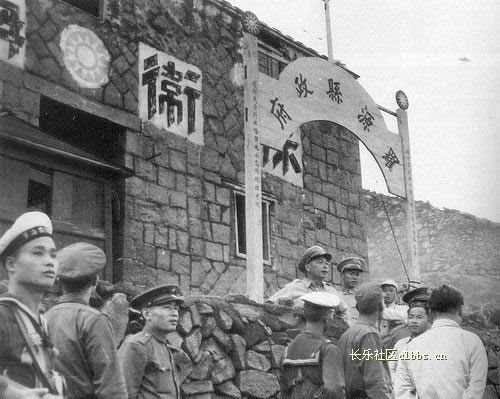 民國37年蔣經國先生視察羅源縣政府